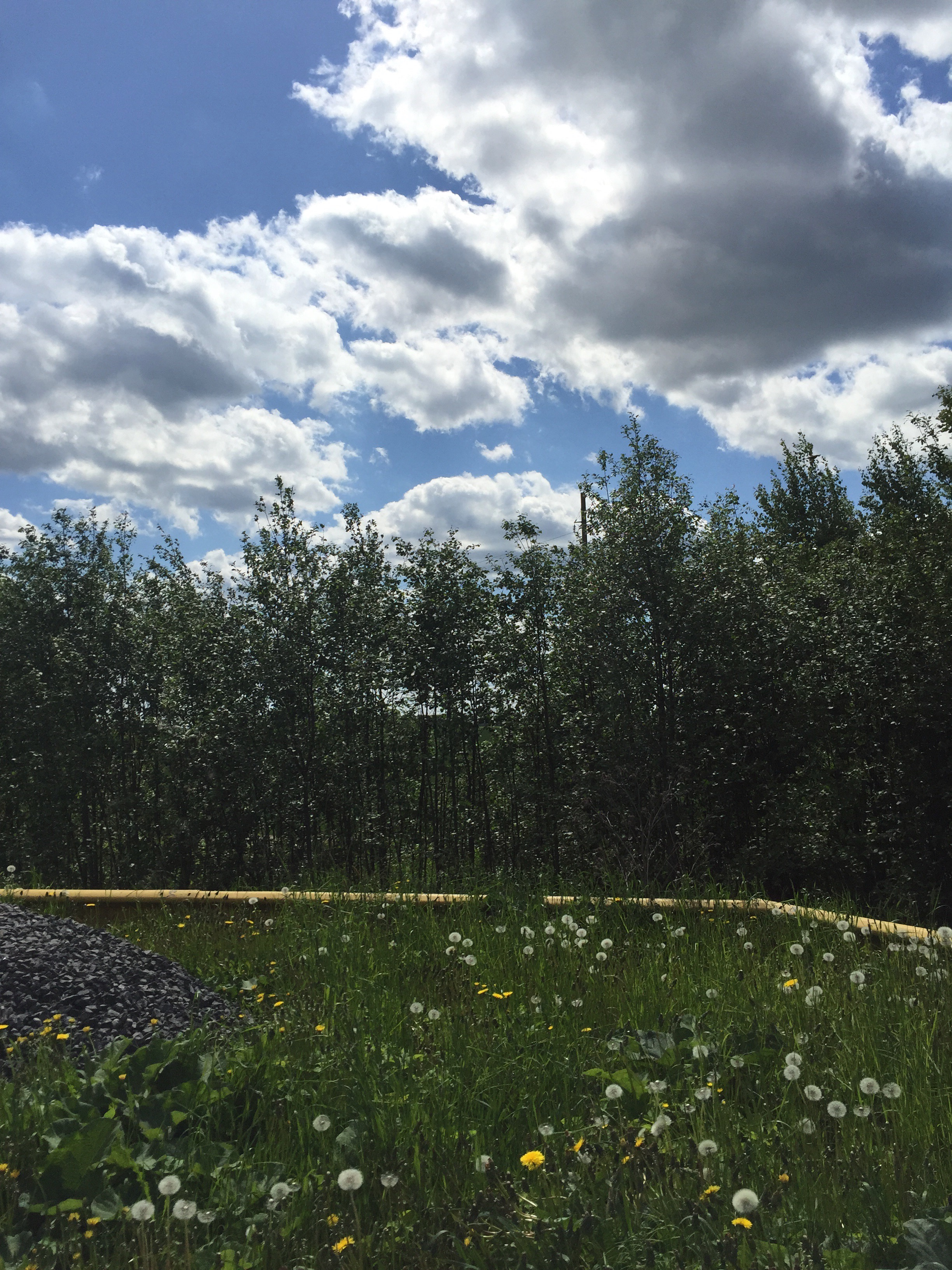 Е105 в Любанском поселении